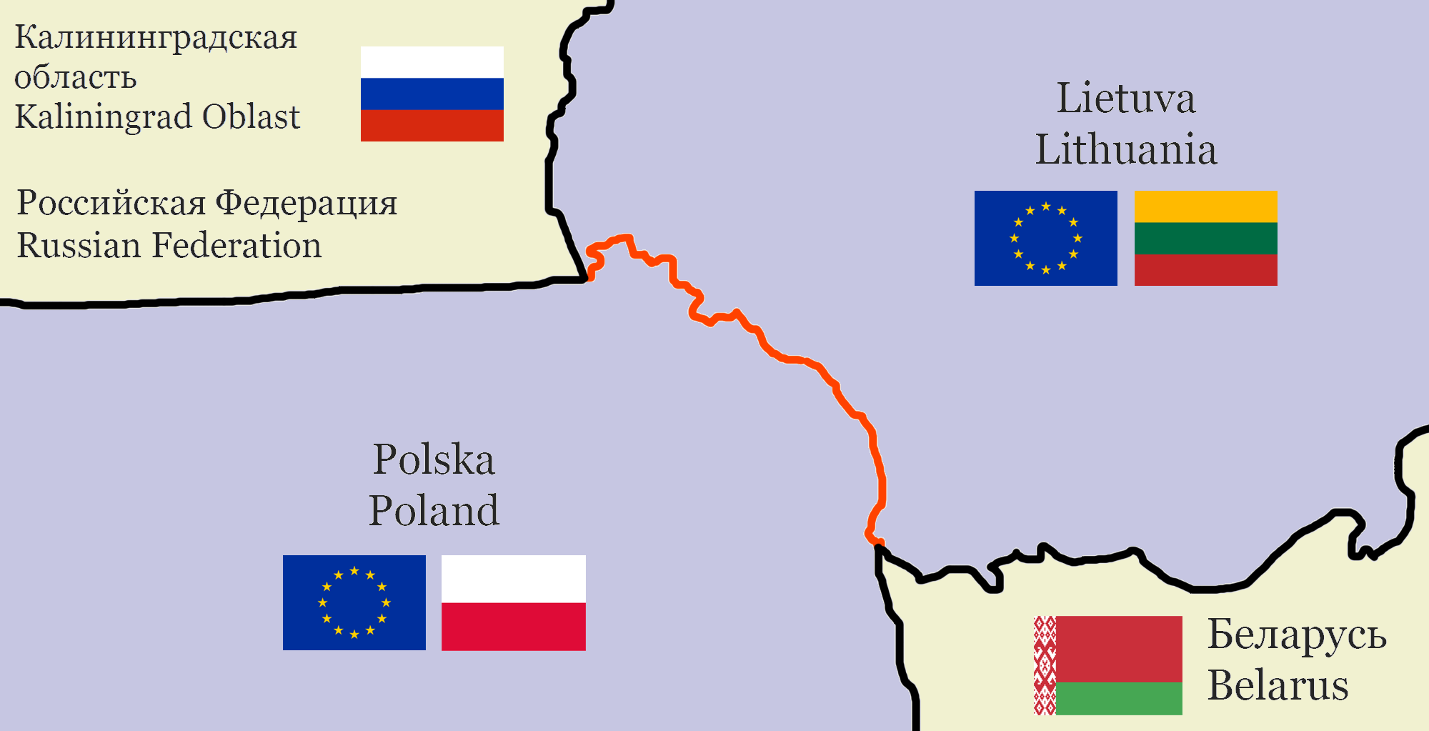 granica polsko-litewska